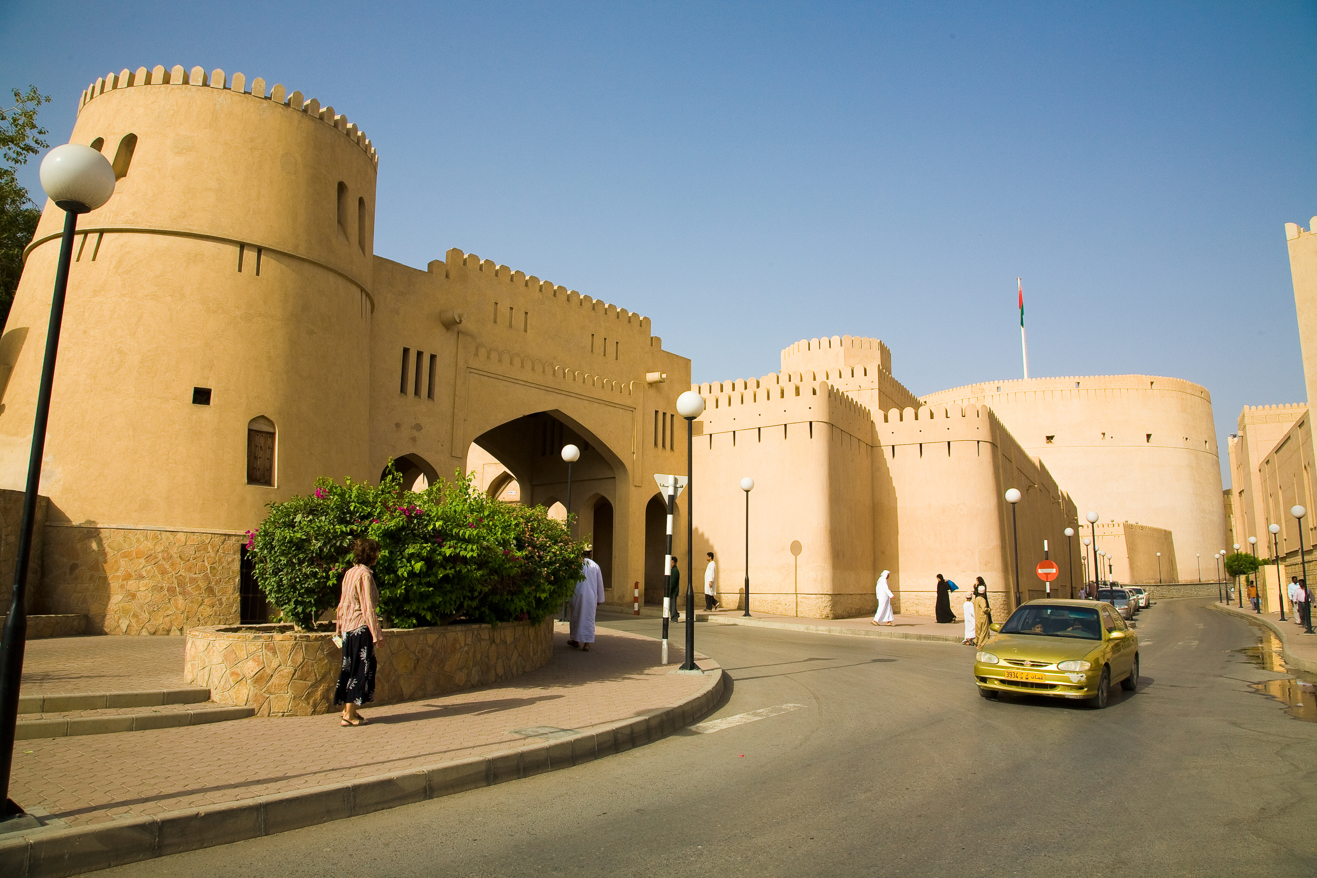 Nizwa, Oman